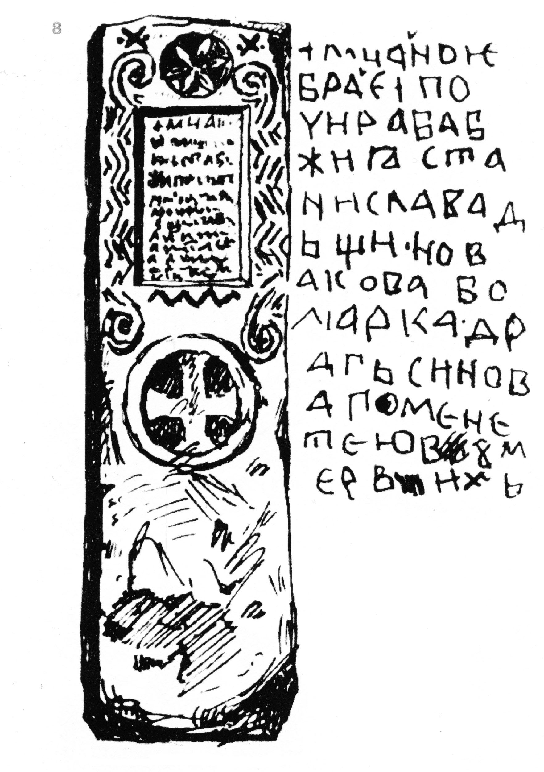 8. Надгробна плоча (а) с кръст от сив пясъчник, пренесена във Видинския музей от с. Гърци, Видинско.Украсена със зигзаговидни орнаменти в краищата, завити волутообразно, розетка и кръст. Надписът й е гравиран (б) в ниско четвъртито поле; в транскрипция той гласи:+ МЦА НОЕБРА ЕI ПОЧИ РАБА БОЖИѨ СТАНИСЛАВА ДЬЩИ НОВАКОВА БОЛГАРКА ДРАГСЬНОВА ПОМЕНЕТЕ Ю ВЪ УМЕРВШИХЪ. Лятото не е отбелязано, но по стила на рисунъка може да го отнесем с положителност към XV-XVI столетие. Размери на плочата: 180x54x26 см; на кръста 22x22 см. Скицирана на 8.VIII.[1]930 г. (Т. 14, обр. 33.)